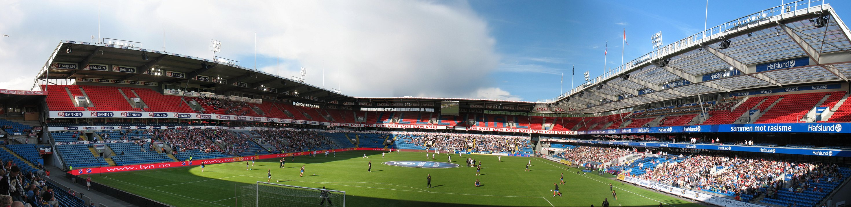 Ullevaal Stadion i Oslo